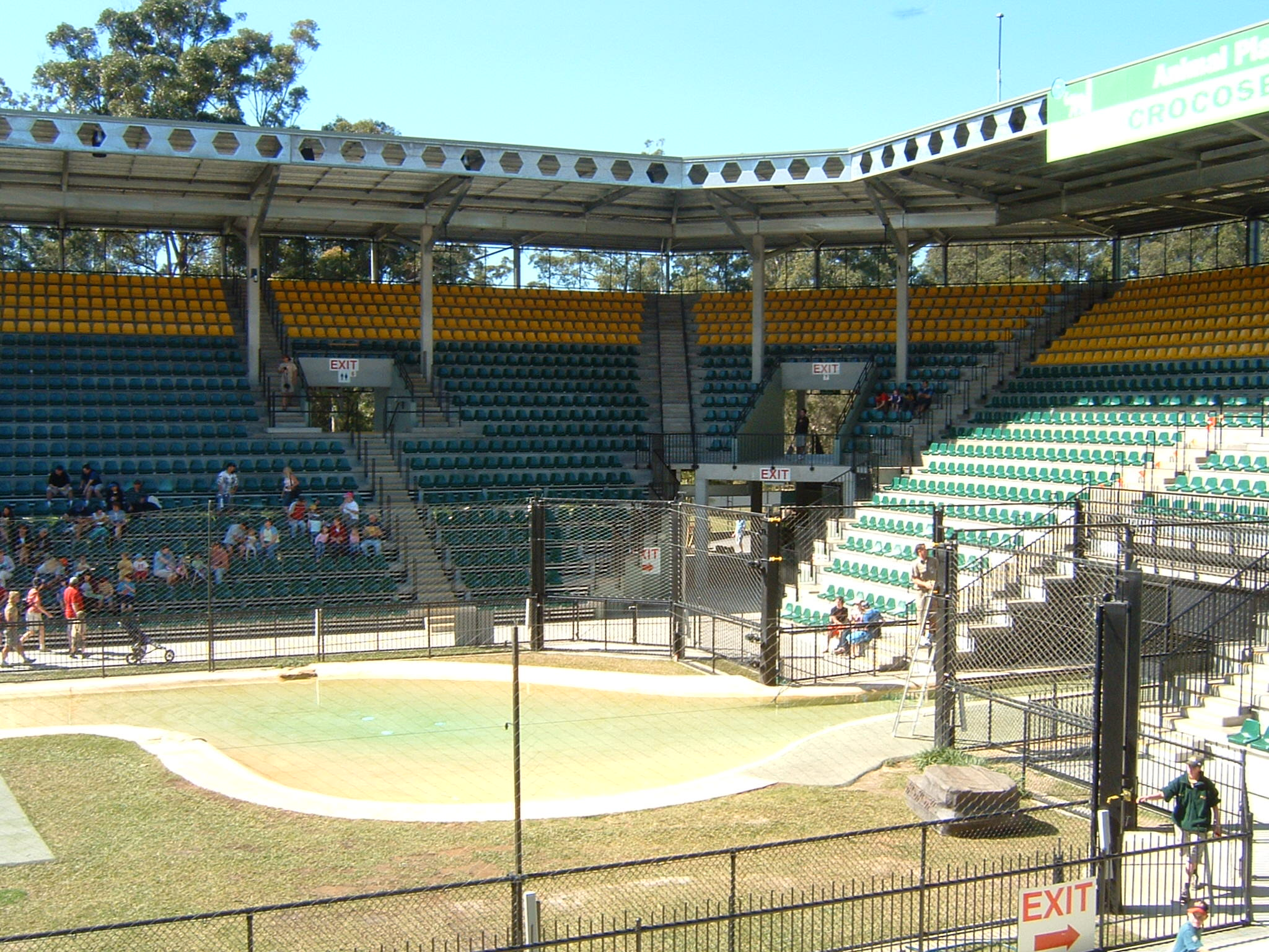 Das Stadion im Australia Zoo